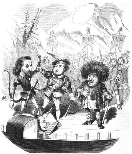 "L'Opéra à Genève en septembre 1849. - Guillaume Tell, acte deuxième. Si parmi nous il est des traîtres ! ... - Caricature par Stop."